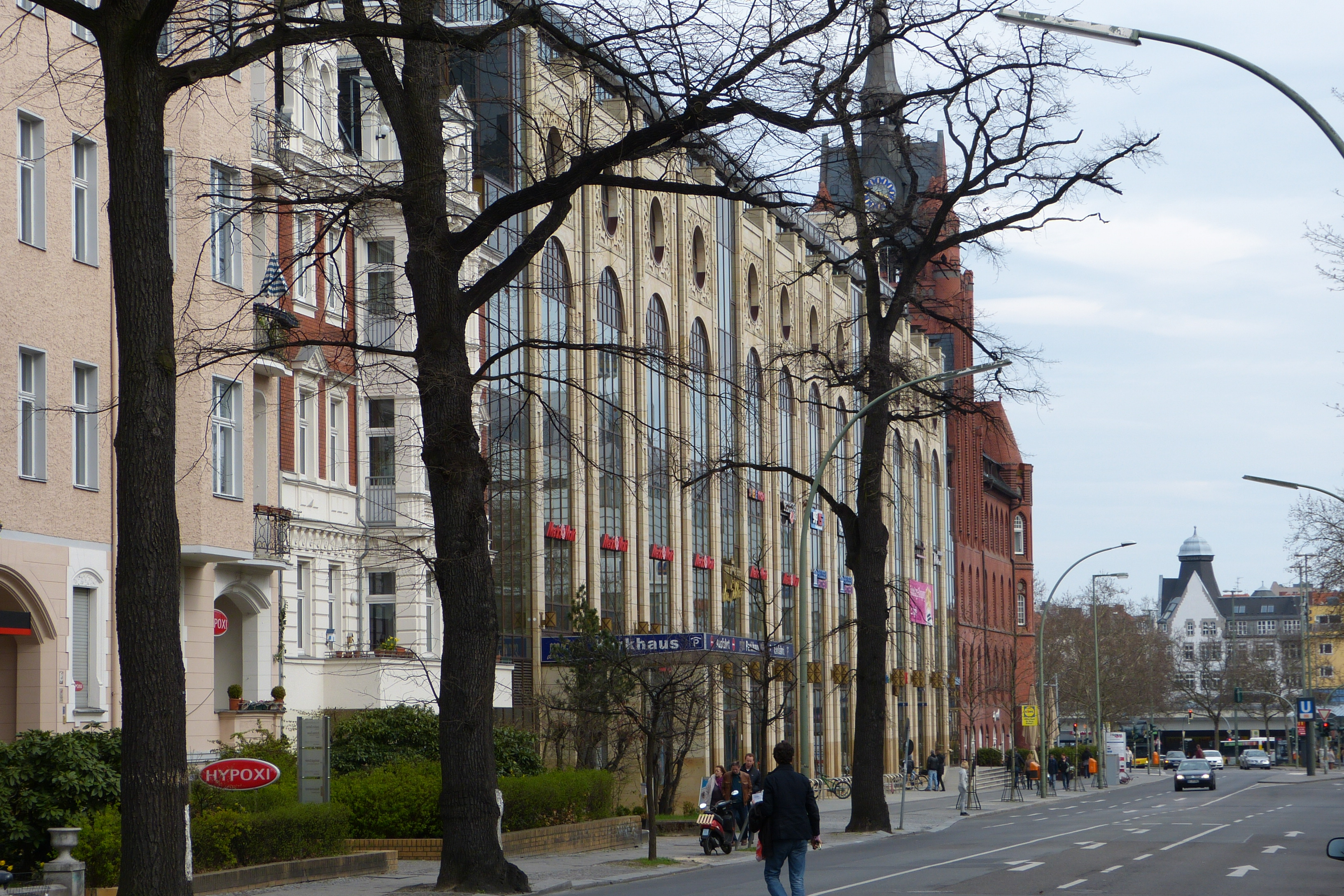 Berlin-Steglitz, Schloßstraße, Einkaufszentrum "Das Schloss", fotografiert von der Grunewaldstraße